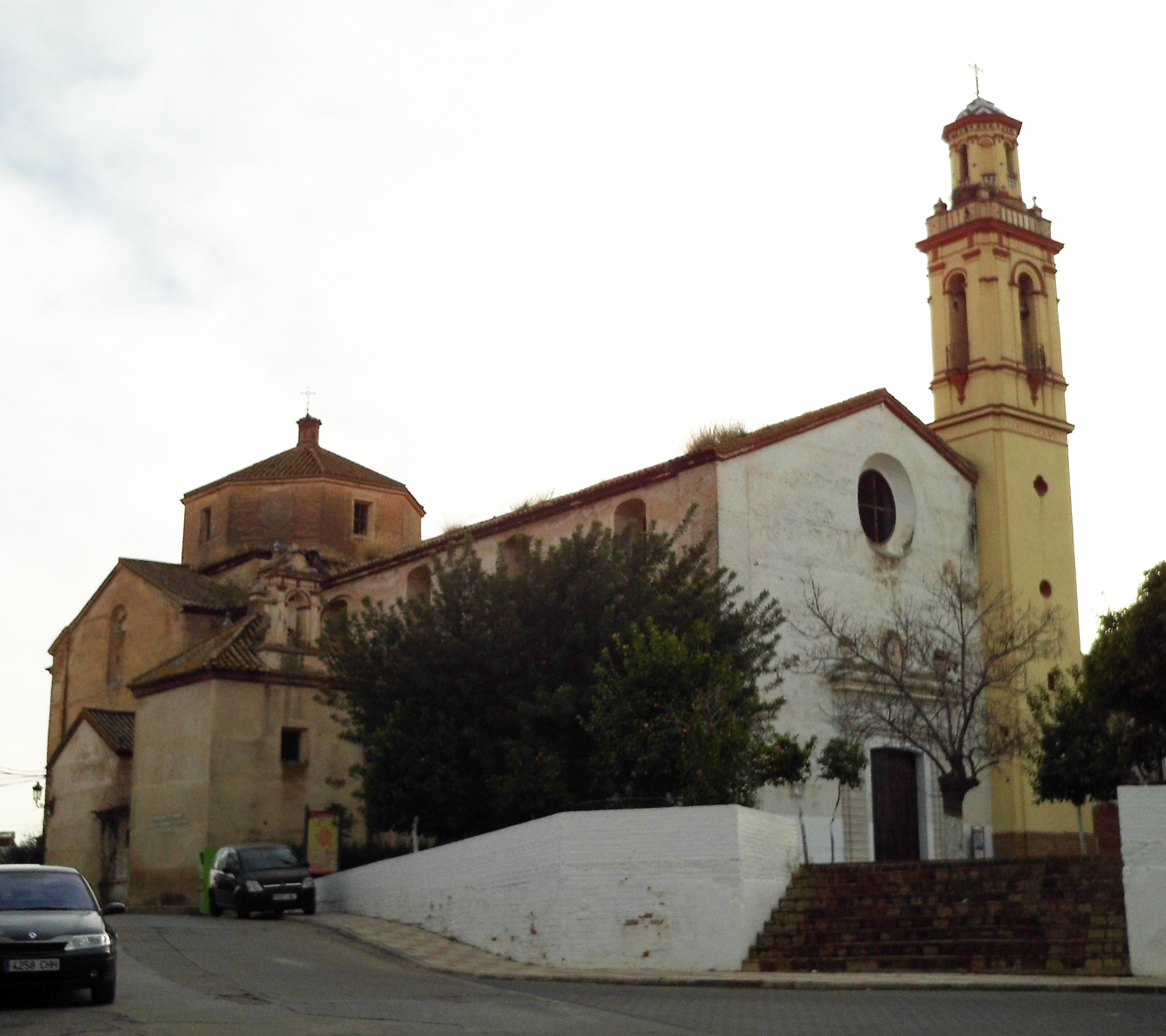 Iglesia de San Sebastián. La Campana. Provincia de Sevilla, Andalucía, España.